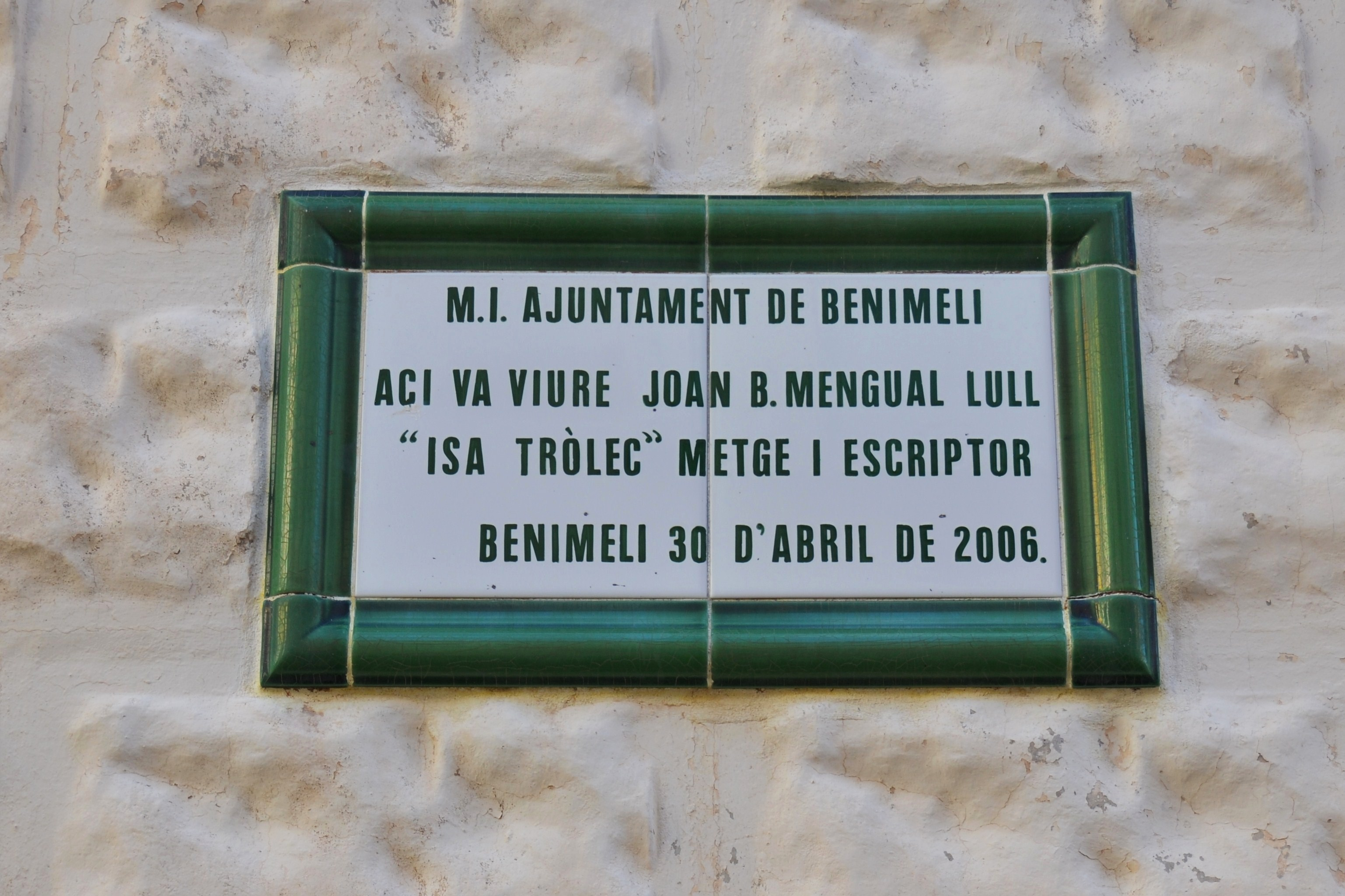 Placa a la casa on va viure Isa Tròlec a Benimeli.